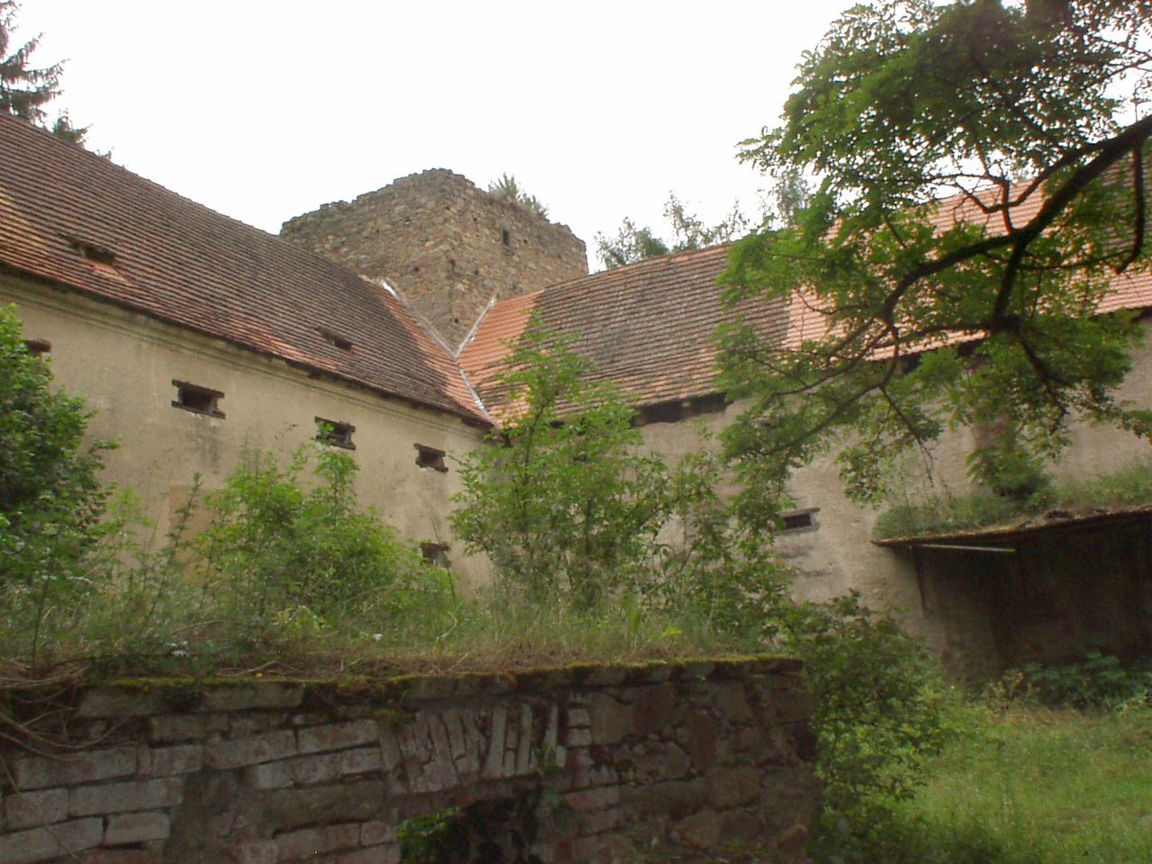 vnitřek tvrze v Buzicích 1